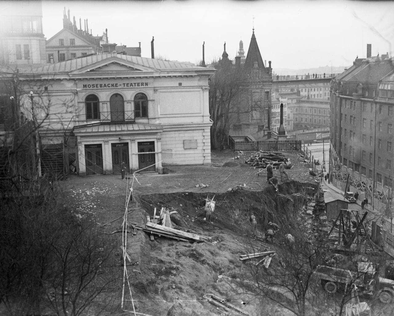 Mosebacke-teatern vid Klevgränd strax innan rivning. Till höger Katarinavägen och i fonden skymtar Stadsmuseet och Sjömanshemmet i kvarteret Stadsgården respektive Ormen.